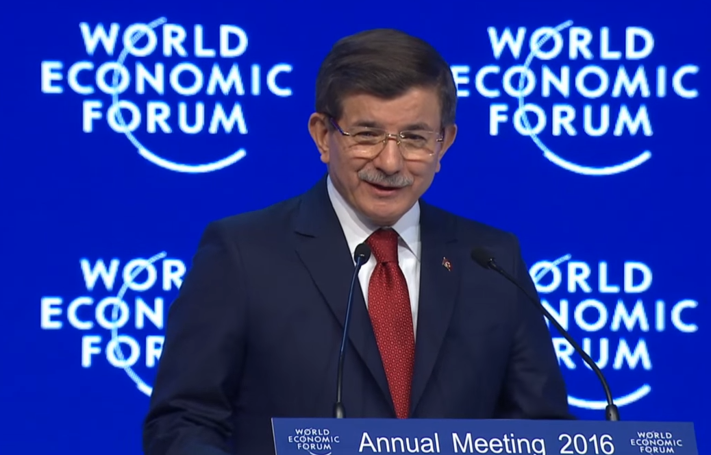 Ahmet Davutoğlu Davos'ta konuşma yaparken.